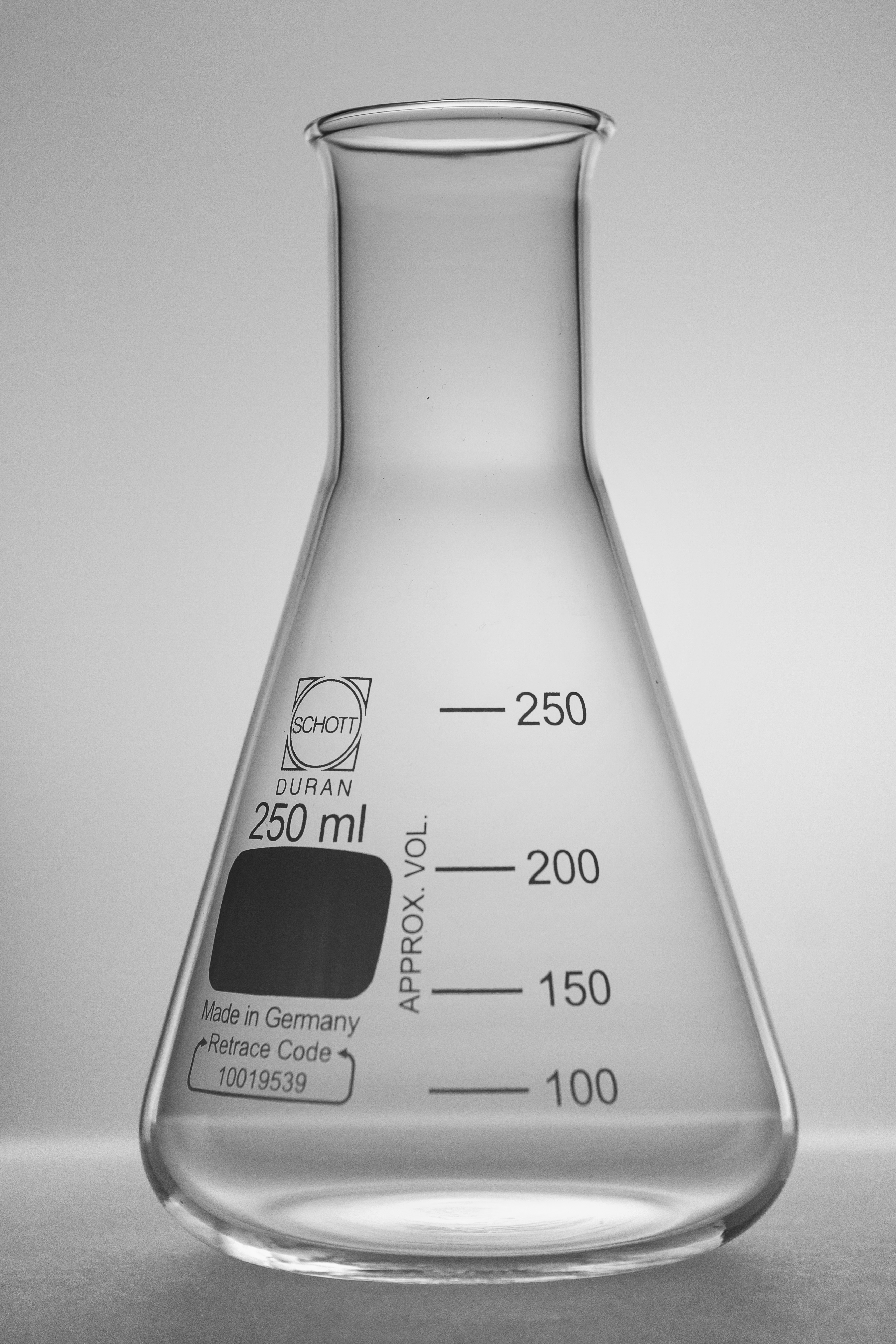 Duran Erlenmeyerkolben enger Hals 250ml